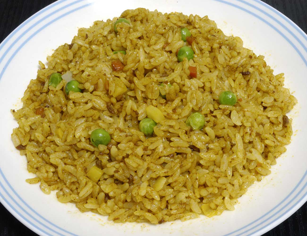 ドライカレーのうち、カレー粉で味付けした炒飯。